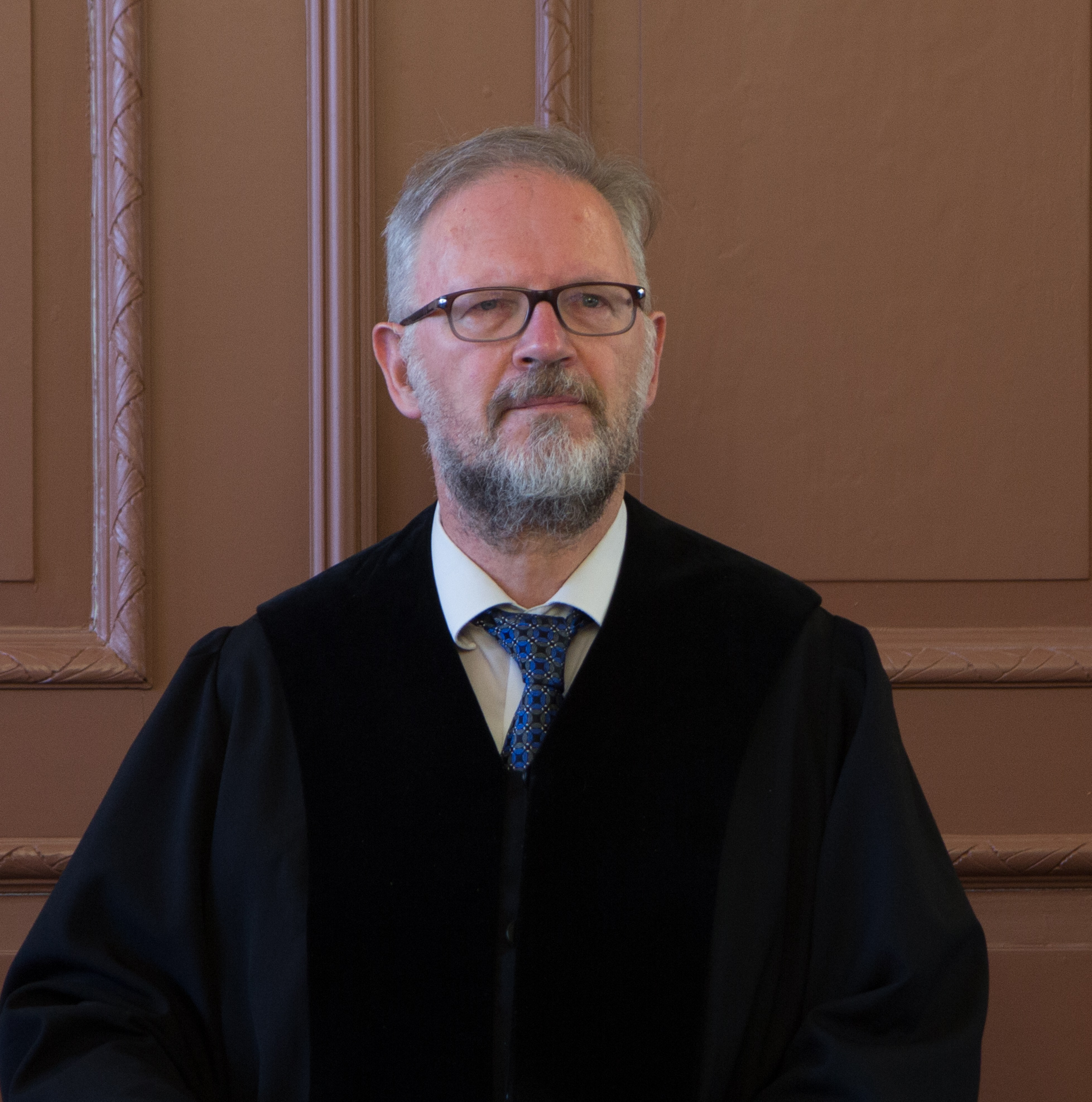 Thüringer Verfassungsgerichtshof. Öffentliche Sitzung am 14. Juni 2017 in Weimar